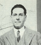 Fotografía del pintor chileno Arturo Gordon